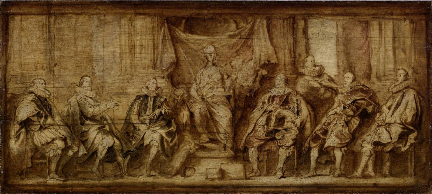 Anton van Dyck, Modello De Brusselse Schepenenkamer of Vierschaar in het bijzijn van Vrouwe Iustitia, 1634-1635. Olieverf in bruin, met wit gehoogd, op paneel, 26,3 x 58,5 cm. Parijs, Ecole Nationale Supérieure des Beaux-Arts, inv. nr. 14409